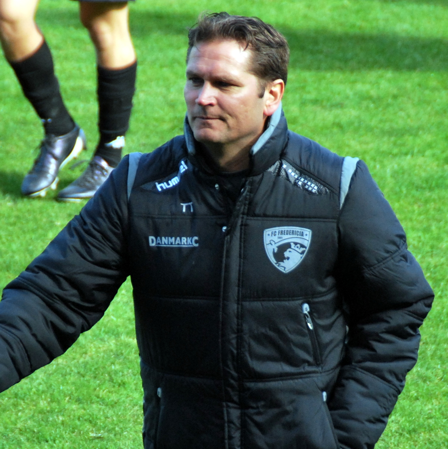 Thomas Thomasberg. Tidligere fodboldspiller, og her som cheftræner for FC Fredericia. Her efter en testkamp på Viborg Stadion.